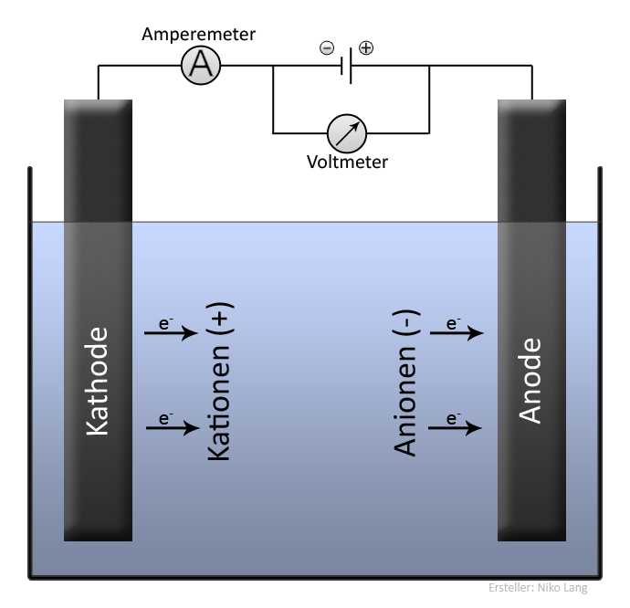 Allgemeine Elektrolyse